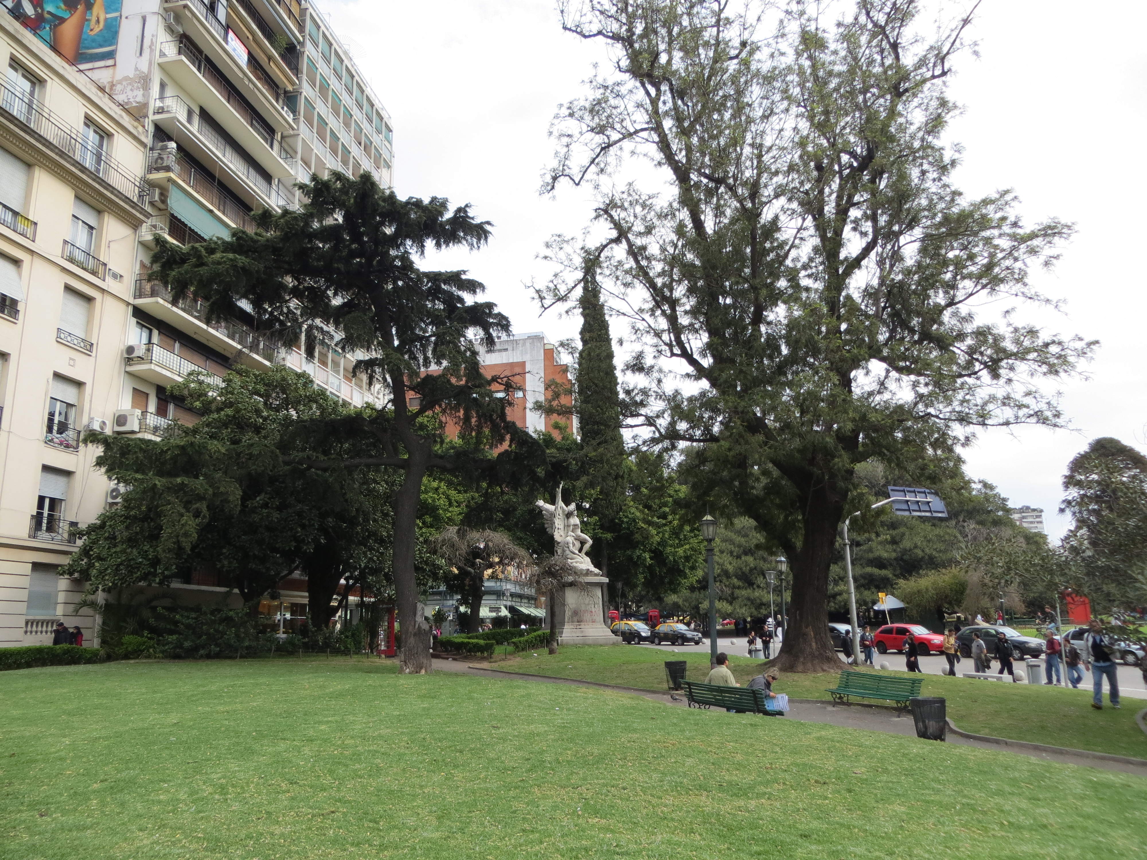 Plaza Ramón J. Cárcano, parte del circuito de plazas de la Recoleta. Se ve la escultura en homenaje a Ramón L. Falcón y Juan Alberto Lartigau.